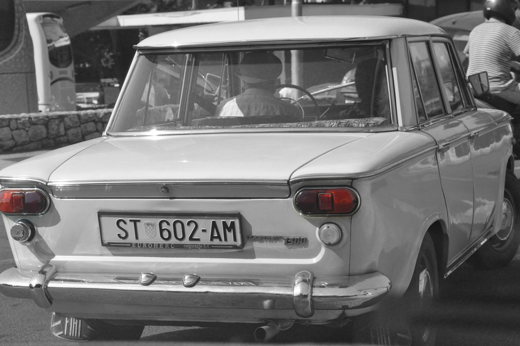 Zastava 1300 in Croatia.